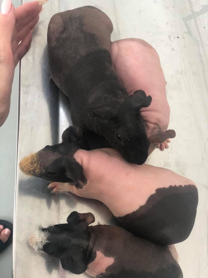 Quatro porquinhos-da-Índia da raça skynny